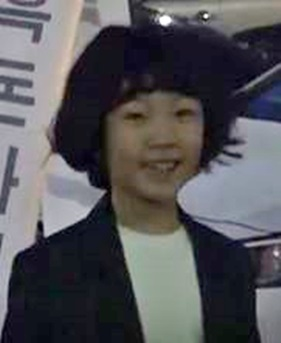 tvN 수목드라마 마더 종방연에 참석한 허율